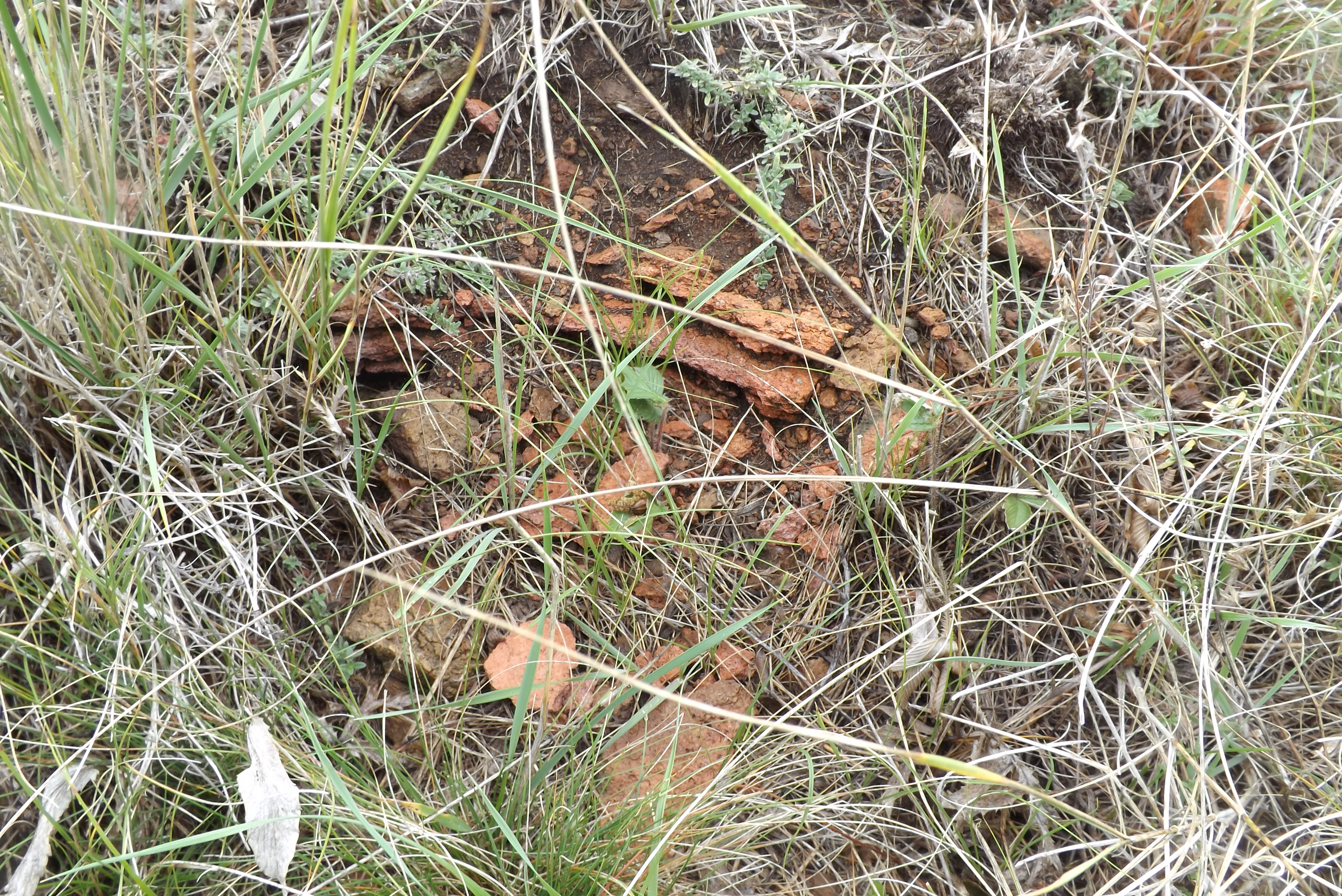 Sály, Latortető